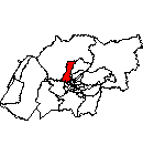 Mapa del distrito de cerro colorado,Arequipa